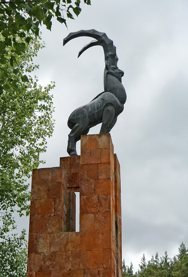 Քարայծ, Հանքավան 6/231